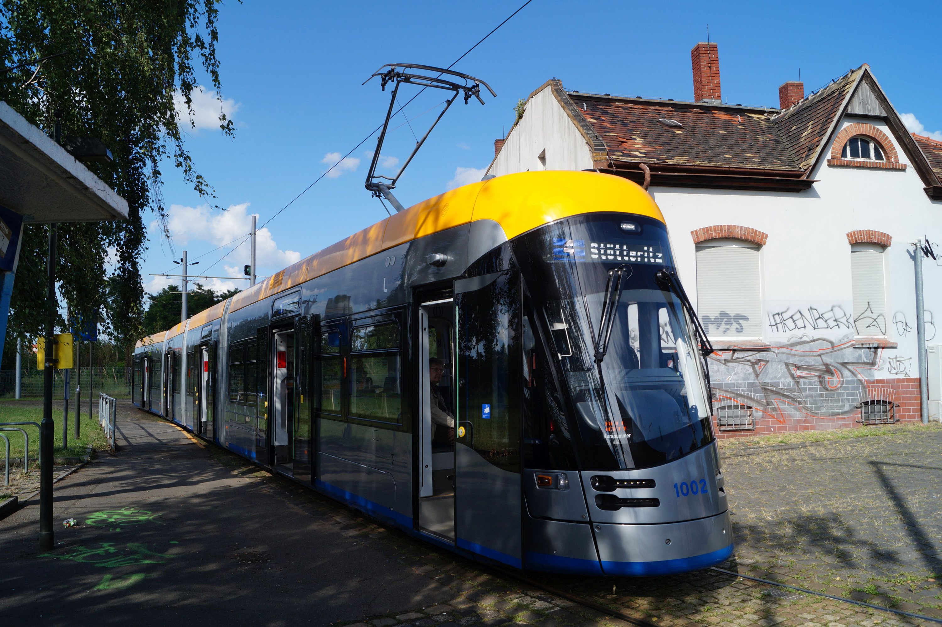 Solaris Tramino NGT10 1002 in Leipzig-Gohlis